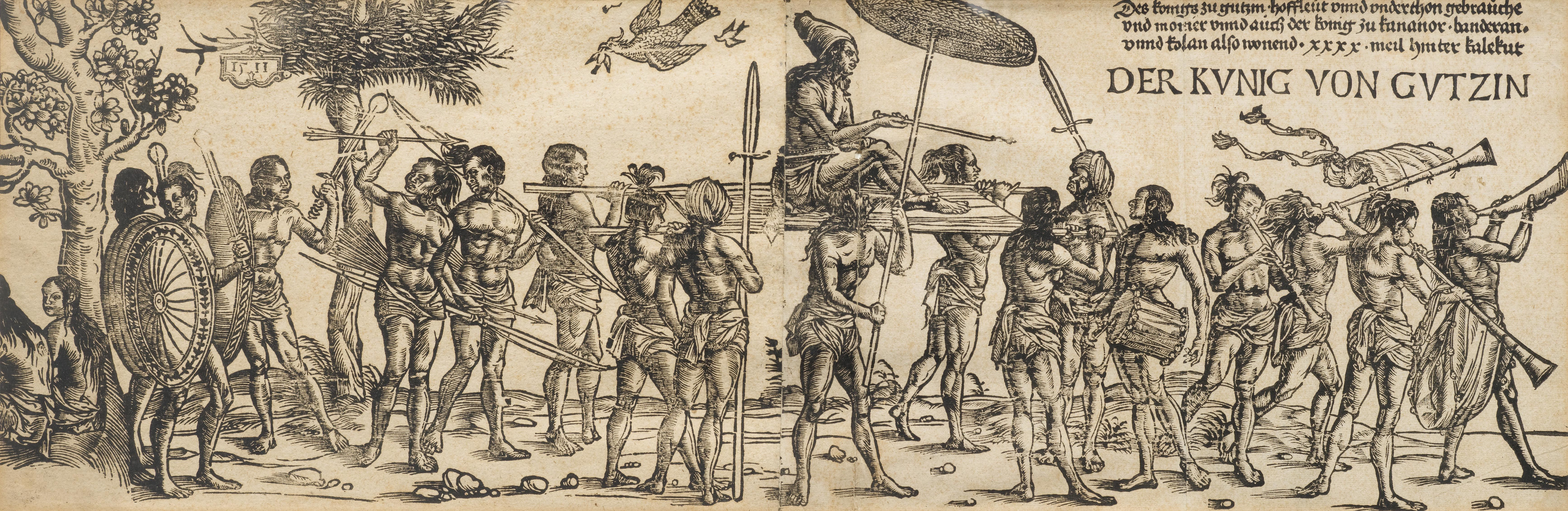 „Kunig von Gutzin“, nach den Schilderungen Balthasar Sprengers gefertigter Holzschnitt, der den in einer Prozession auf einer Art Sänfte getragenen König des Reichs von Kochi zeigt; 25,5 x 77 cm